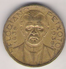 Verso de uma moeda de 2000 Réis cunhada em 1939. This graphic was created with GIMP.